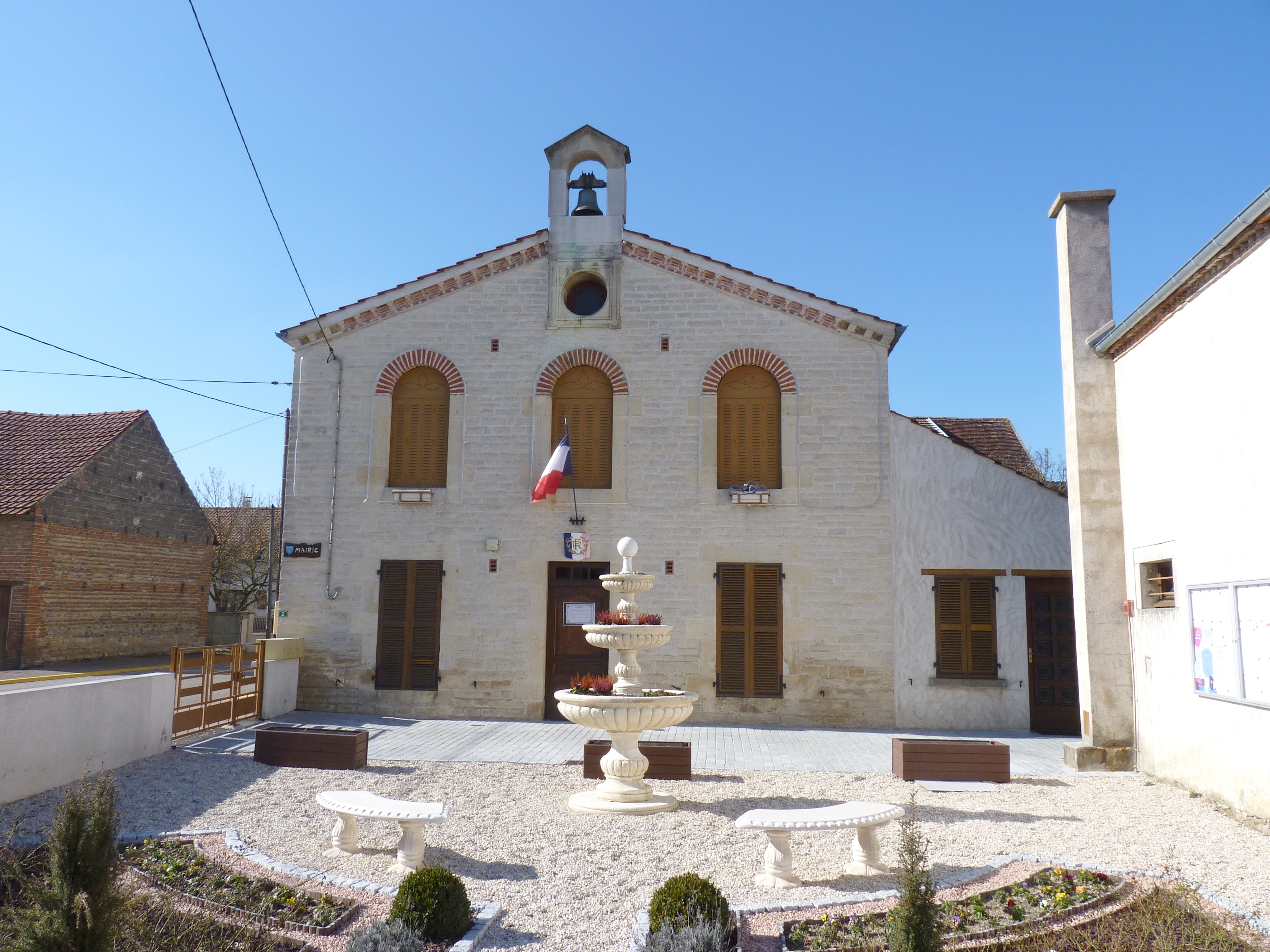 Mairie, Bessey-lès-Cîteaux (Côte d'Or, Bourgogne, France)